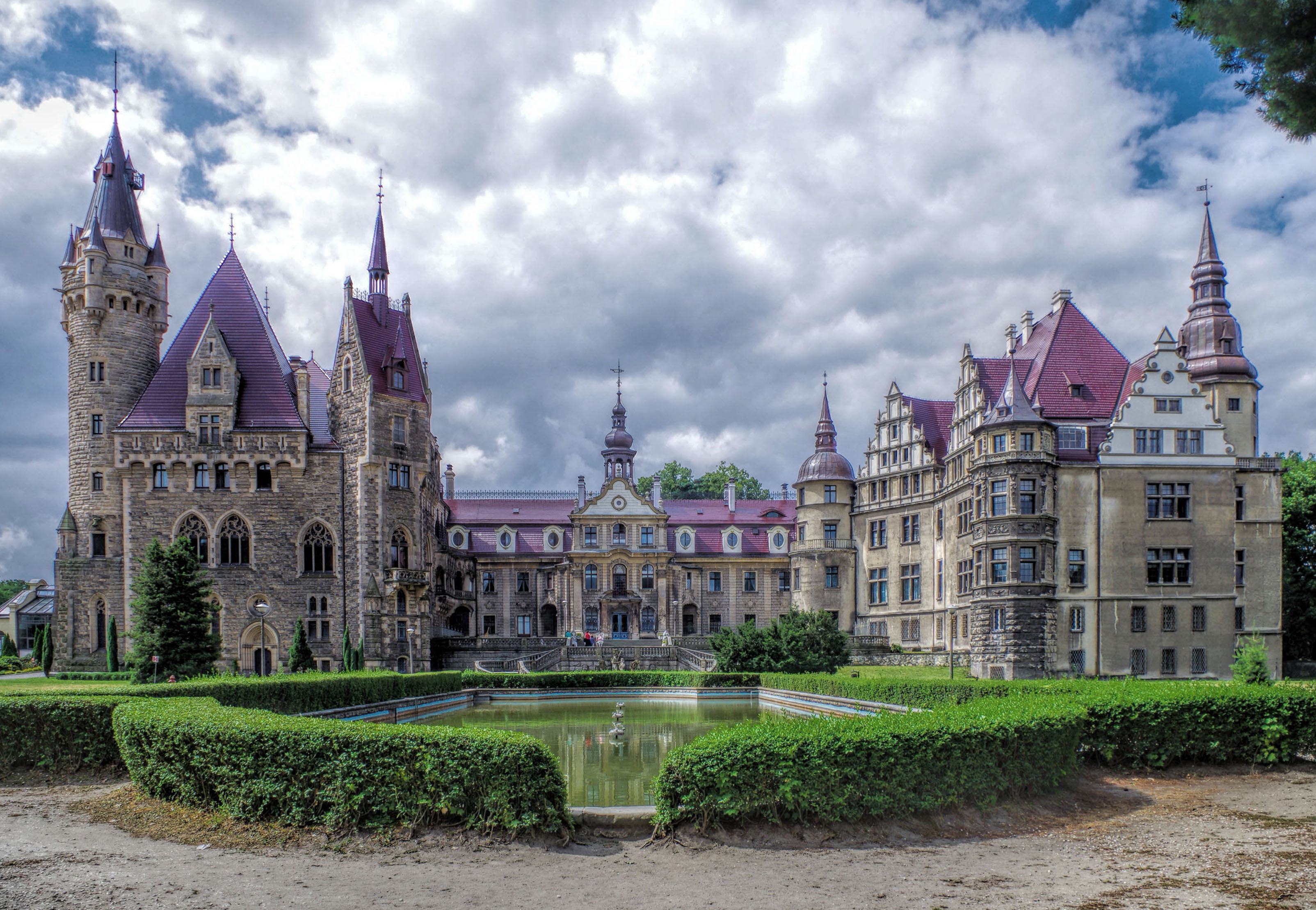 Moszna, zespół pałacowy, XVIII, XX